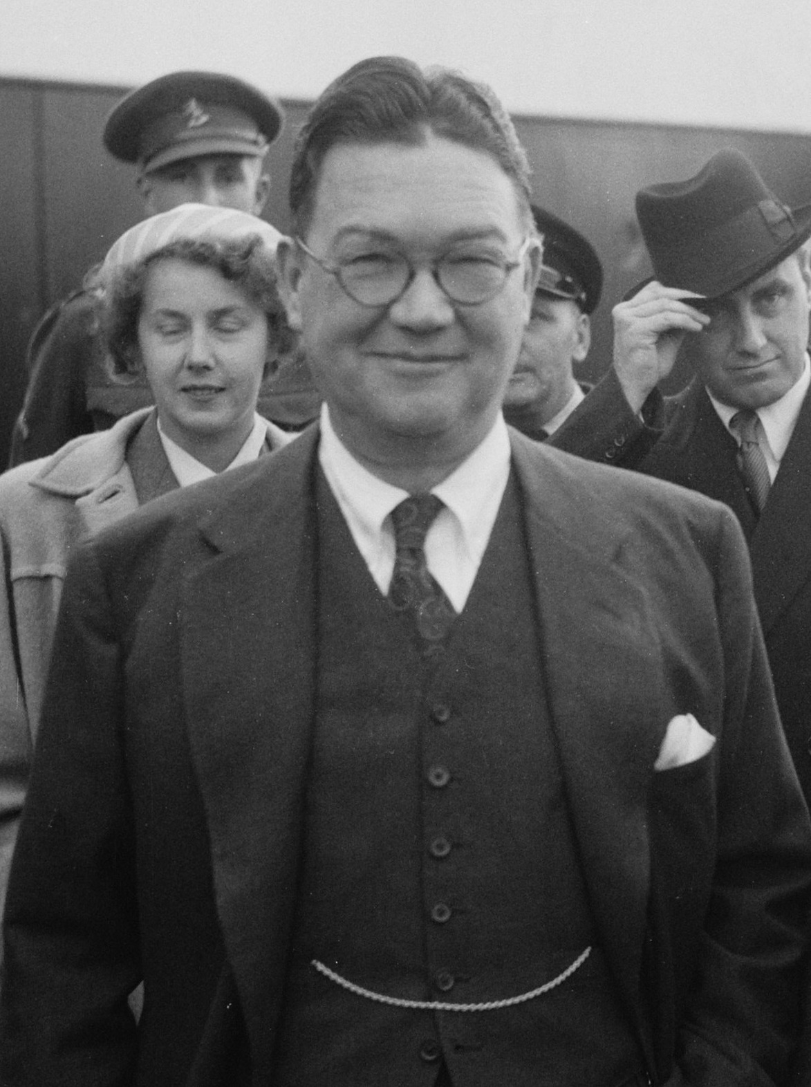 Selden Chapin